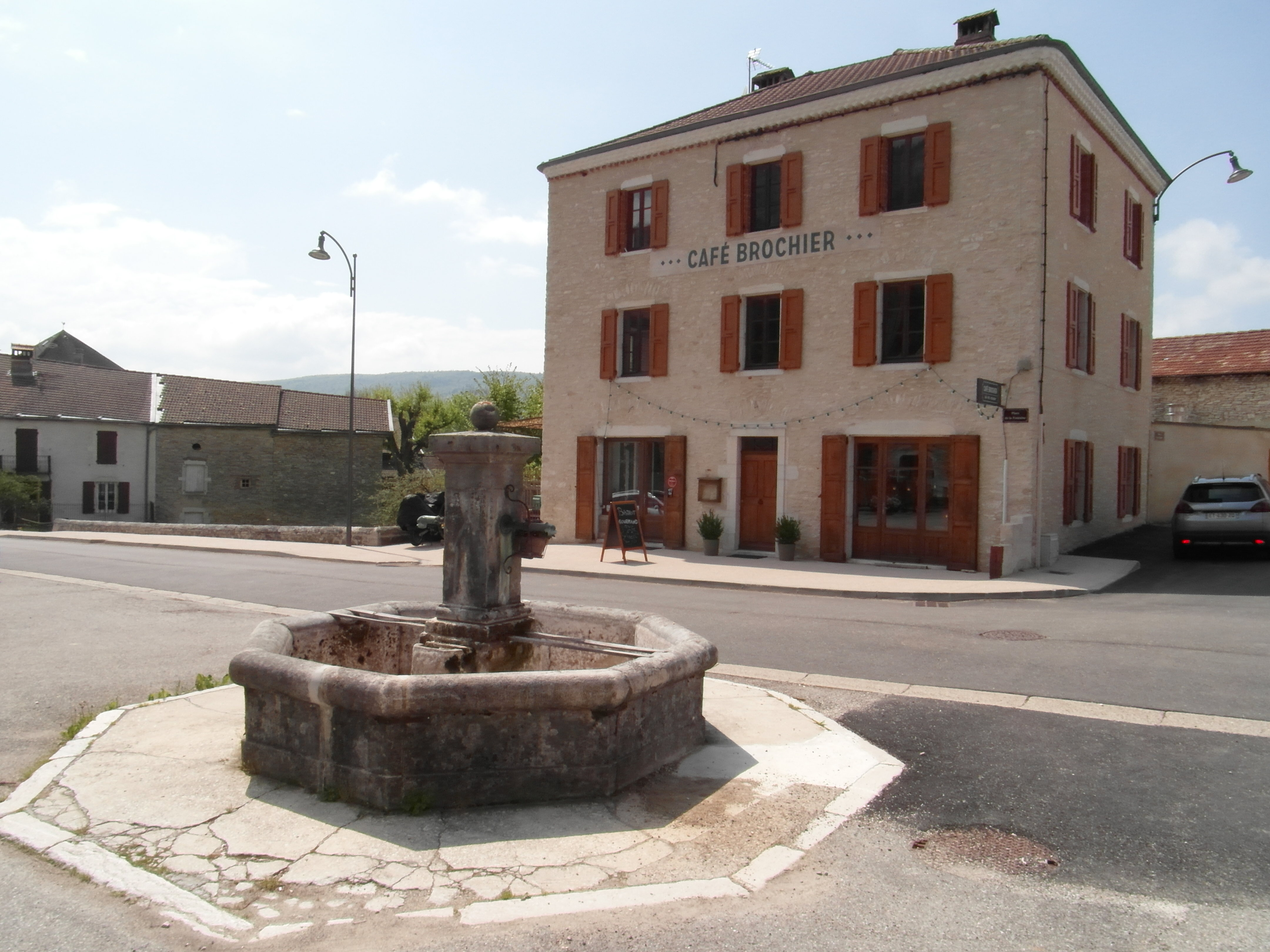 Fontaine et café Brochier (1870) de Saint-Julien-en-Vercors